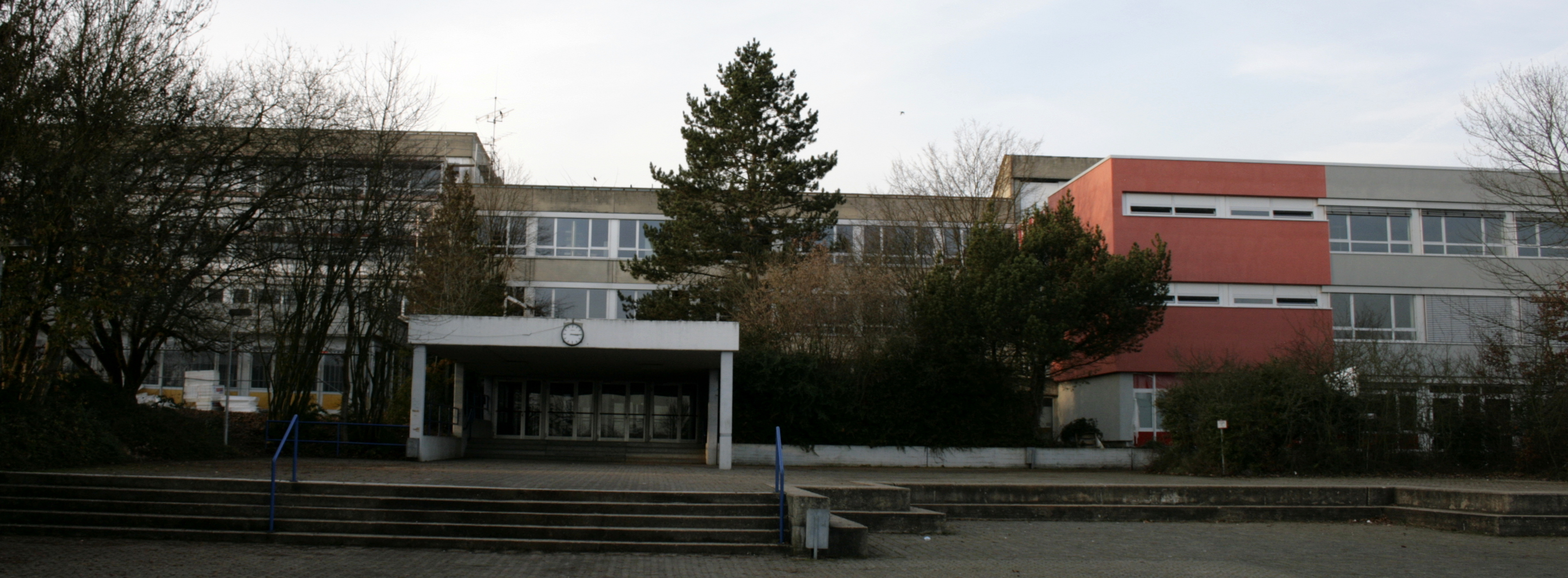 Fürst-Johann-Ludwig-Schule in Niederhadamar, Deutschland